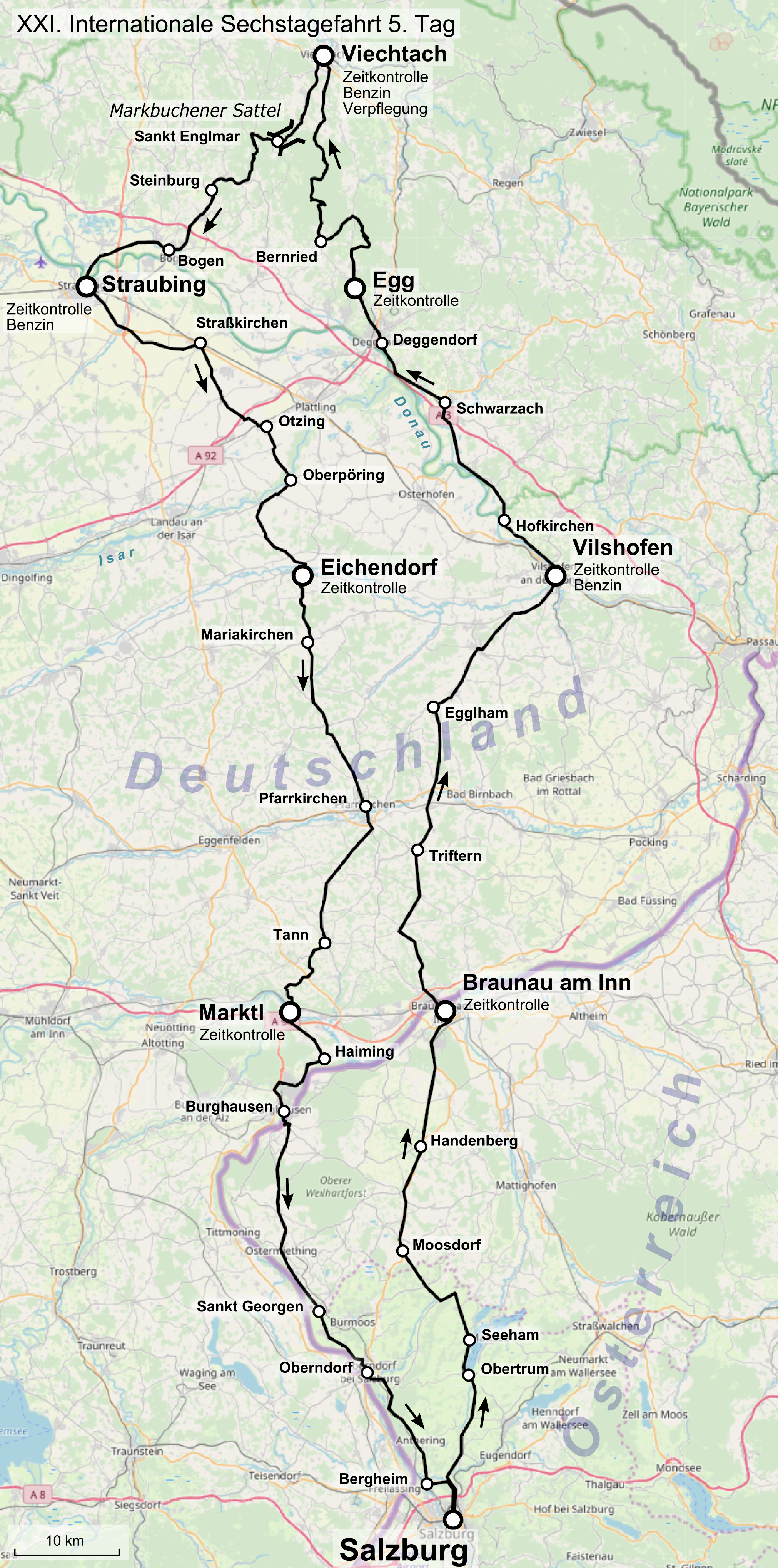 Karte der 21. Internationale Sechstagefahrt, Route des 5. Tages